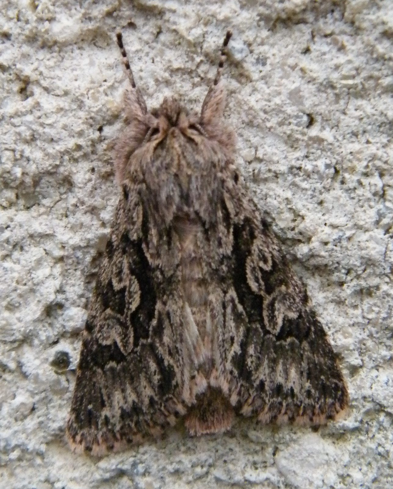 Xylocampa aerola, Noctuelle du Chèvrefeuille, Forest-Montiers, Somme, France.